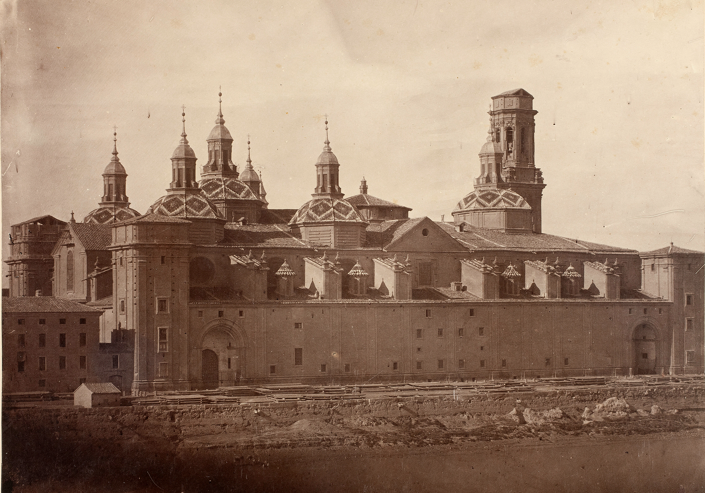 Vista posterior de la Basílica del Pilar de Zaragoza, antes de 1866, albúmina sobre papel, 190 x 253 mm.